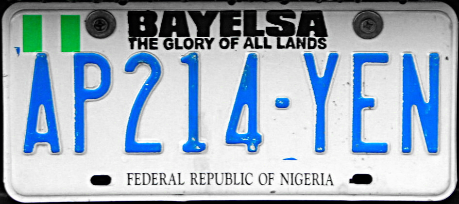 Targa automobilistica nigeriana